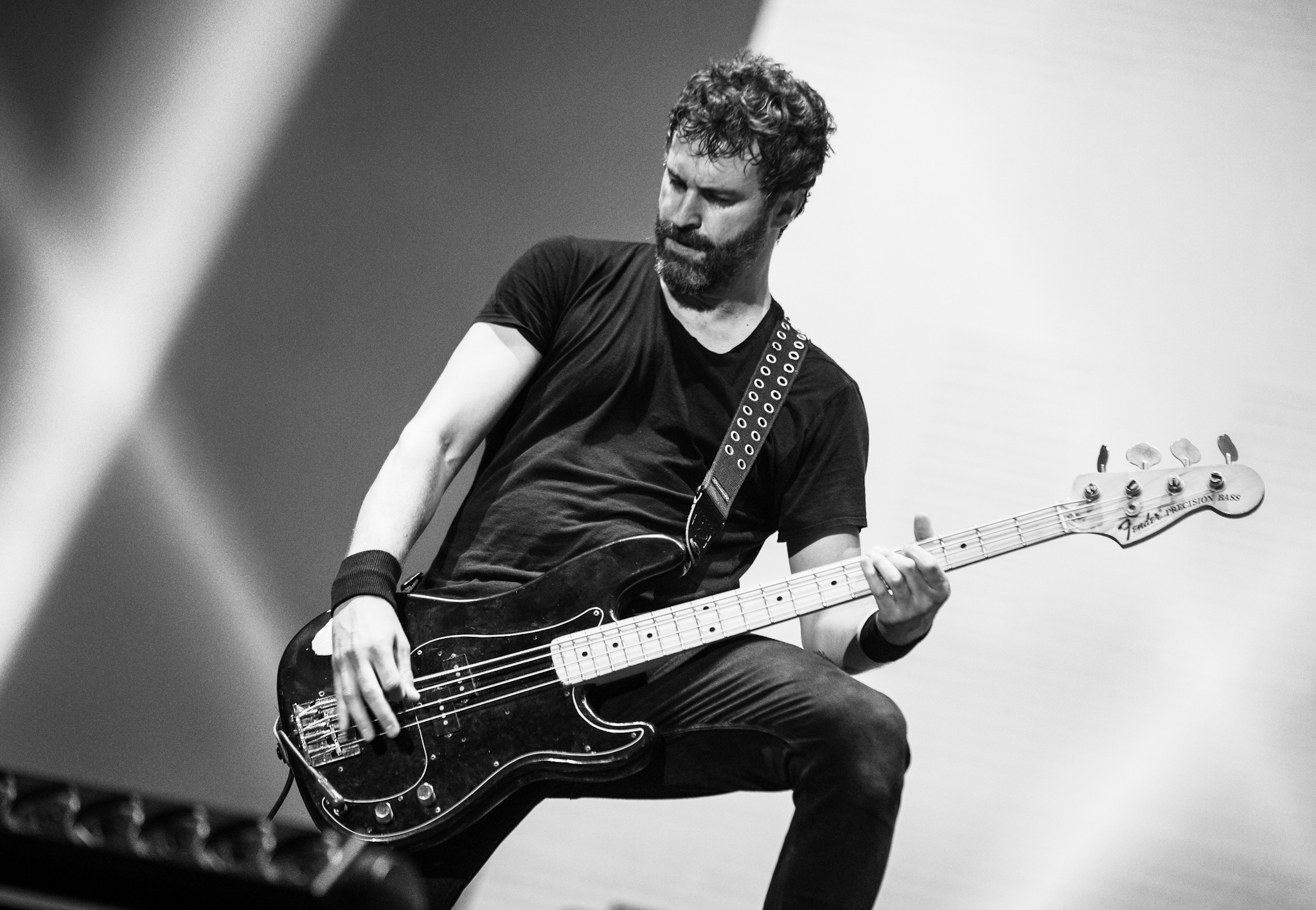 Berri Txarrak Lagunartean kontzertuaren irudiak. Kobetamendin, 2019ko uztailaren 14a. Gaizka Peñafielen argazkiak. Argazkiak edozein erabilerarako libre utzi ditu hemen aitortu duenaren arabera